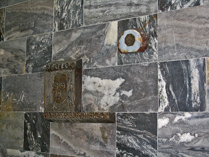 Tablica pamiątkowa patrona szkoły Józefa Zwierzyckiego w Zespole Szkoły Podstawowej i Gimnazjum w Krobi.